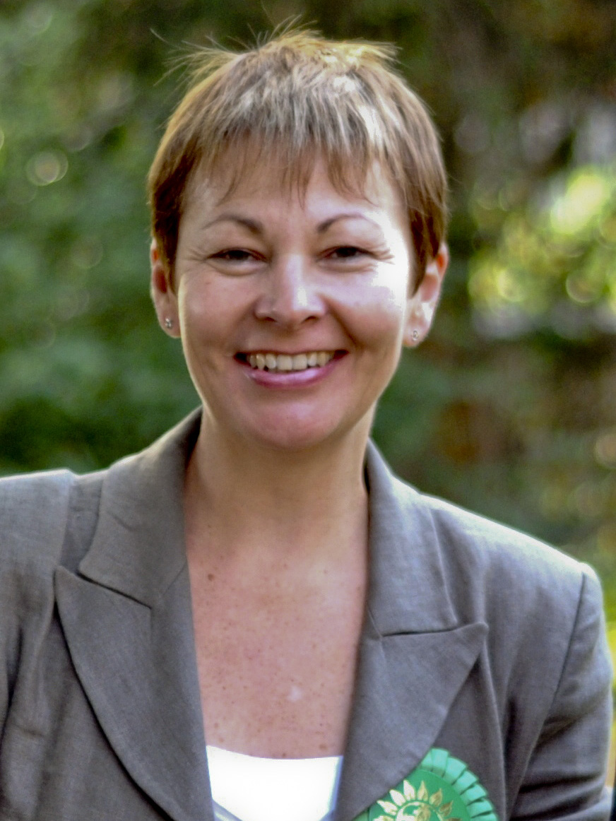 Caroline Lucas